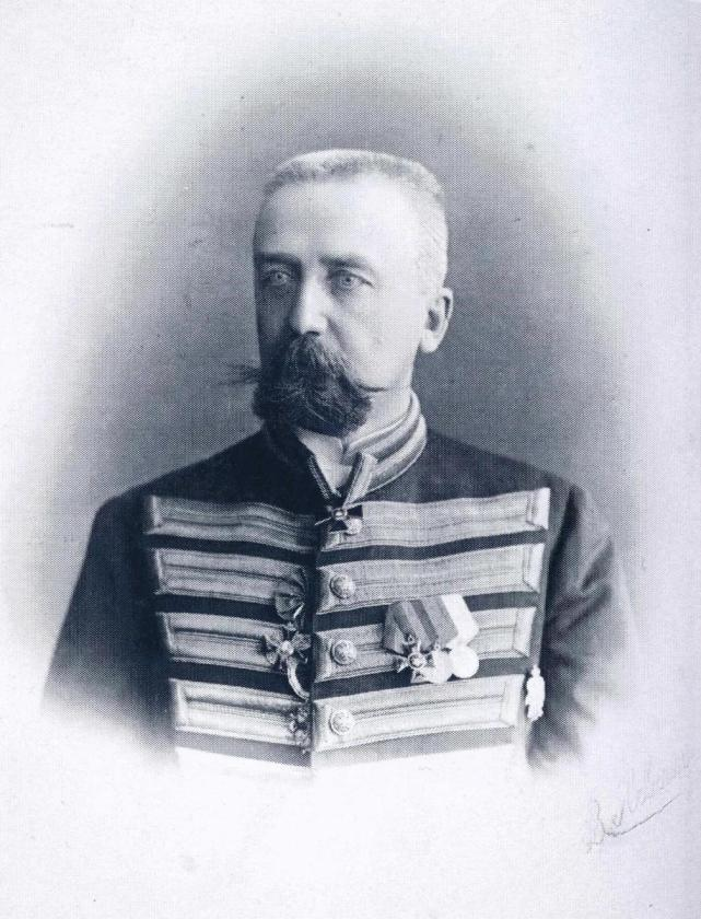 Ministerivaltiosihteerin apulainen Carl Alexander Armfelt (1850–1925).